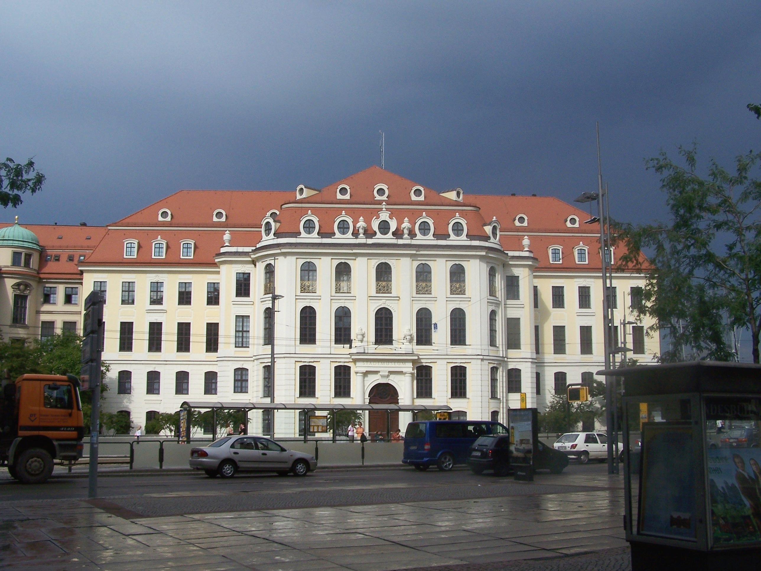 Altes Landhaus in Dresden, heute Sitz des Stadtmuseums